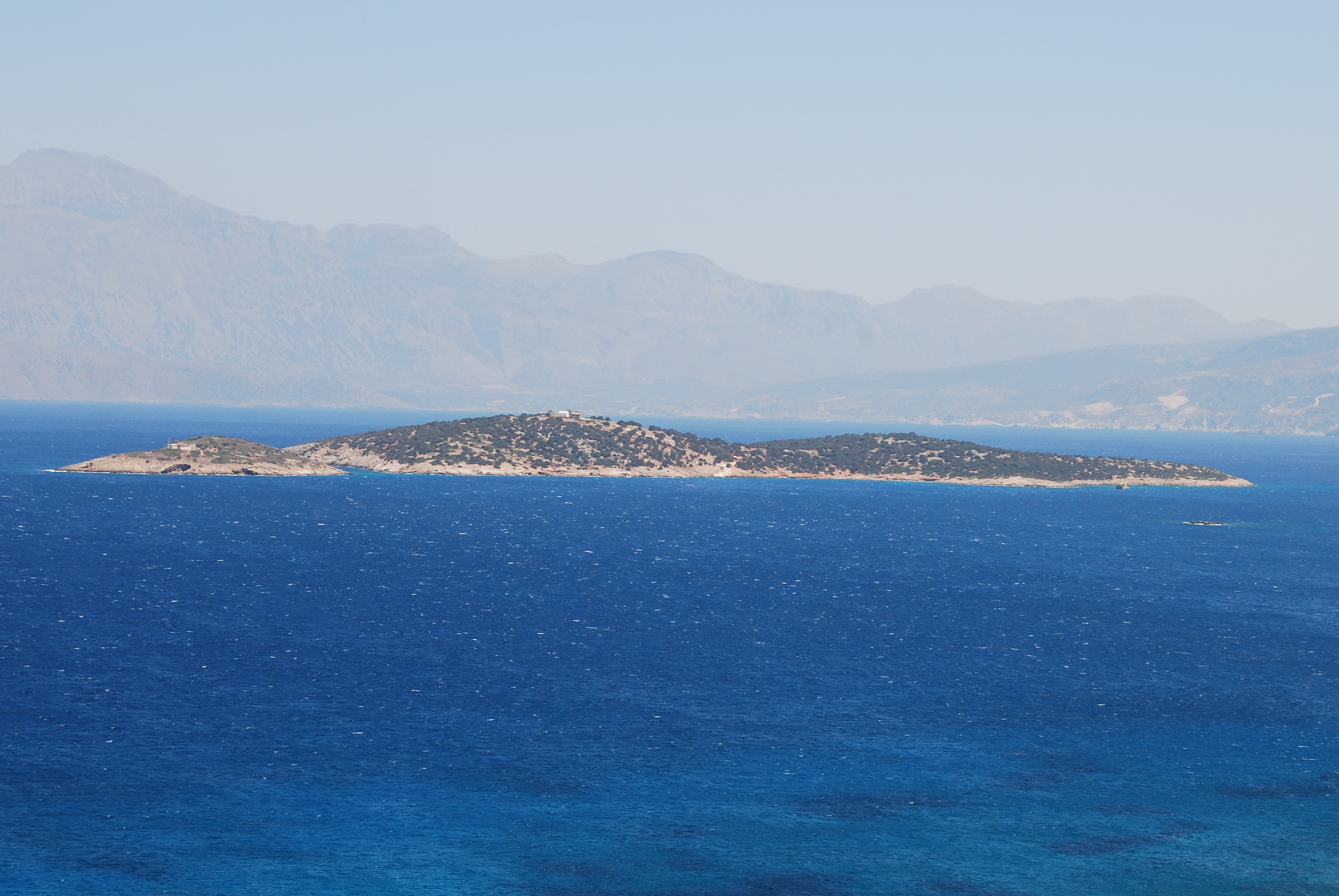 Mikronisi and Agii Pandes, Agios Nikolaos, Crete, Greece